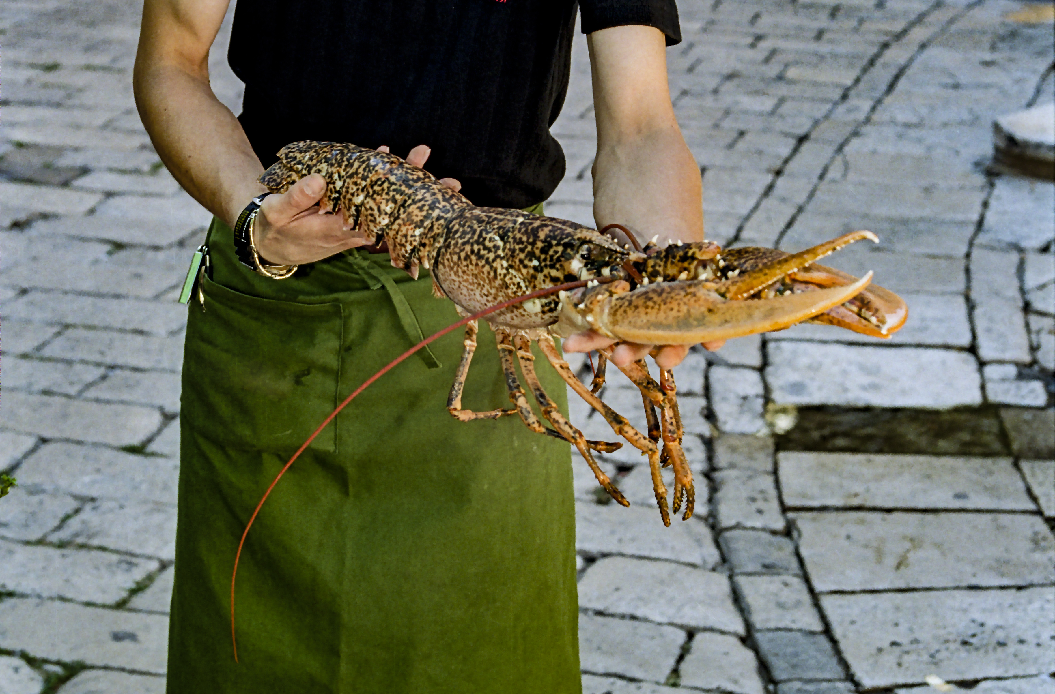 European lobster